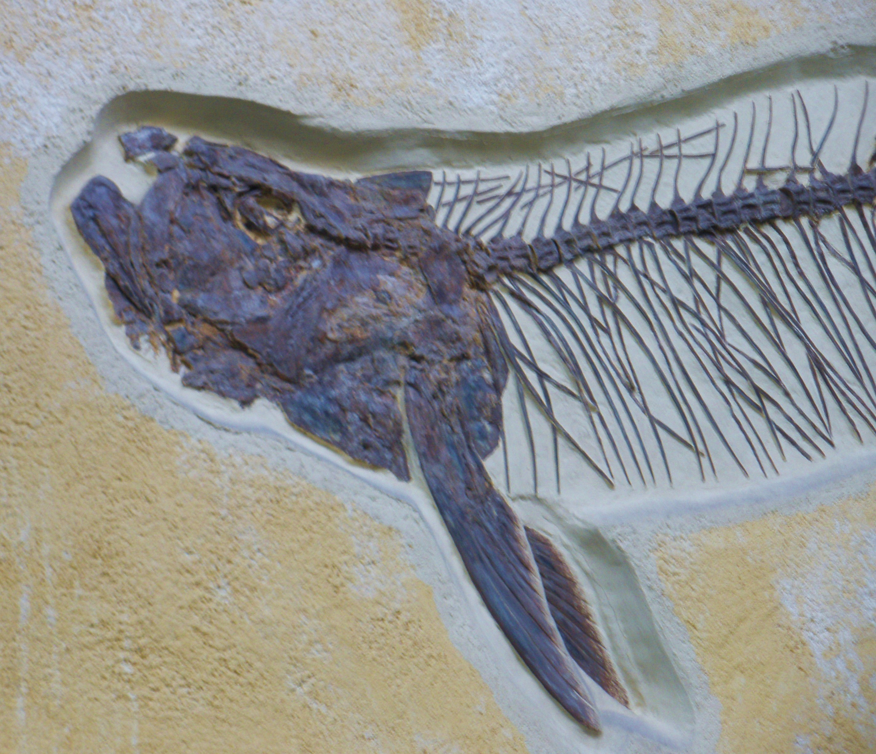 Fossil Gillicus